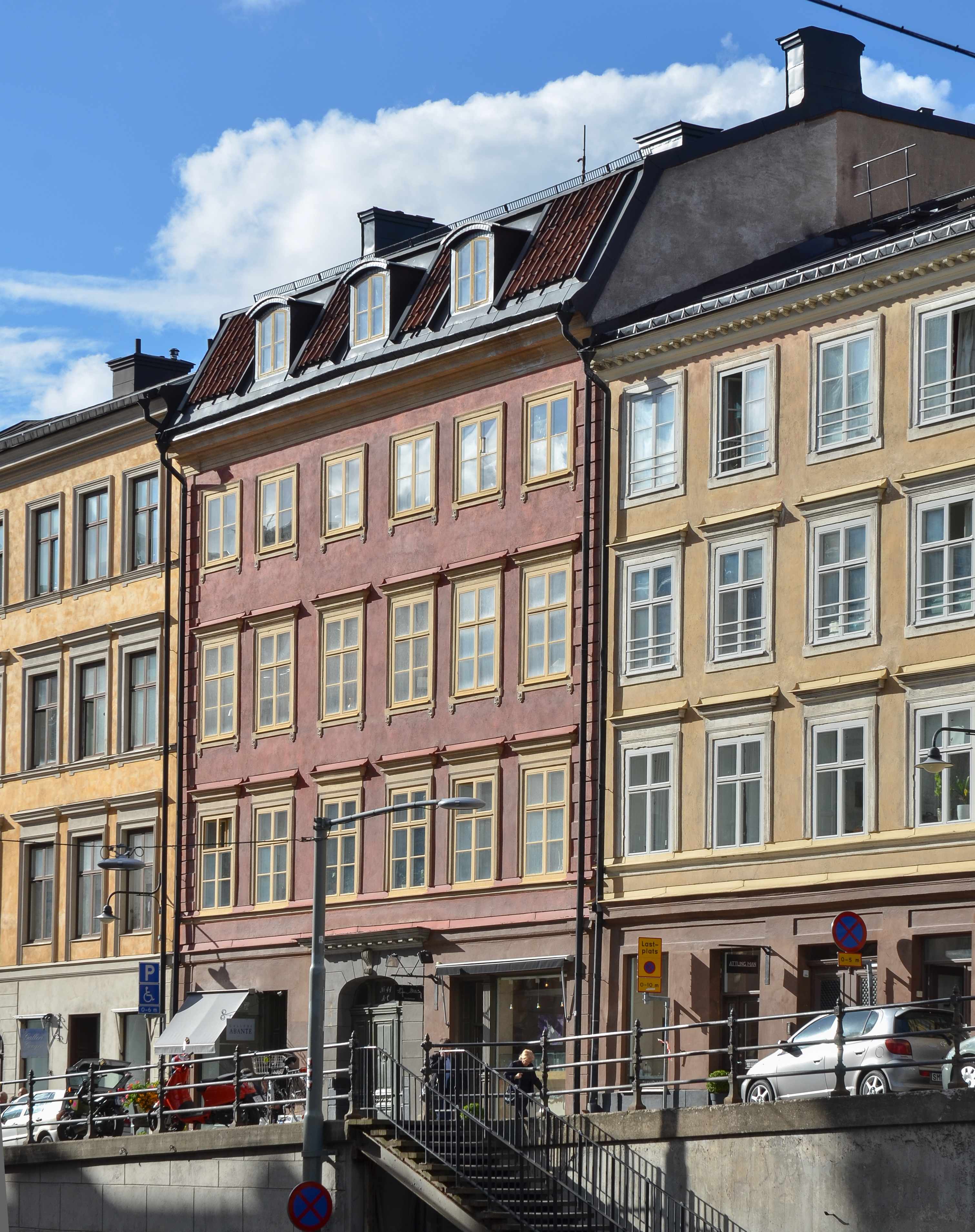 Hornsgatan 44, Södermalm, Stockholm.